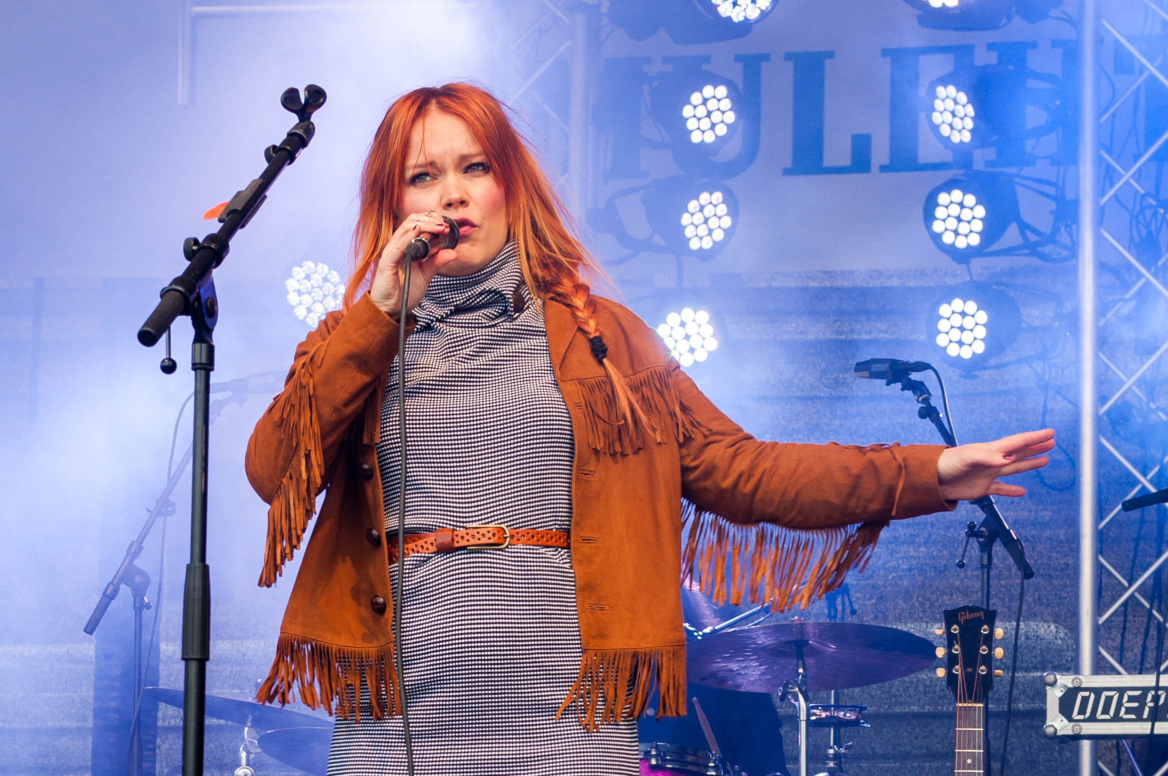 Anna Puu esiintymässä Tampereen keskustorilla 5.4.2014